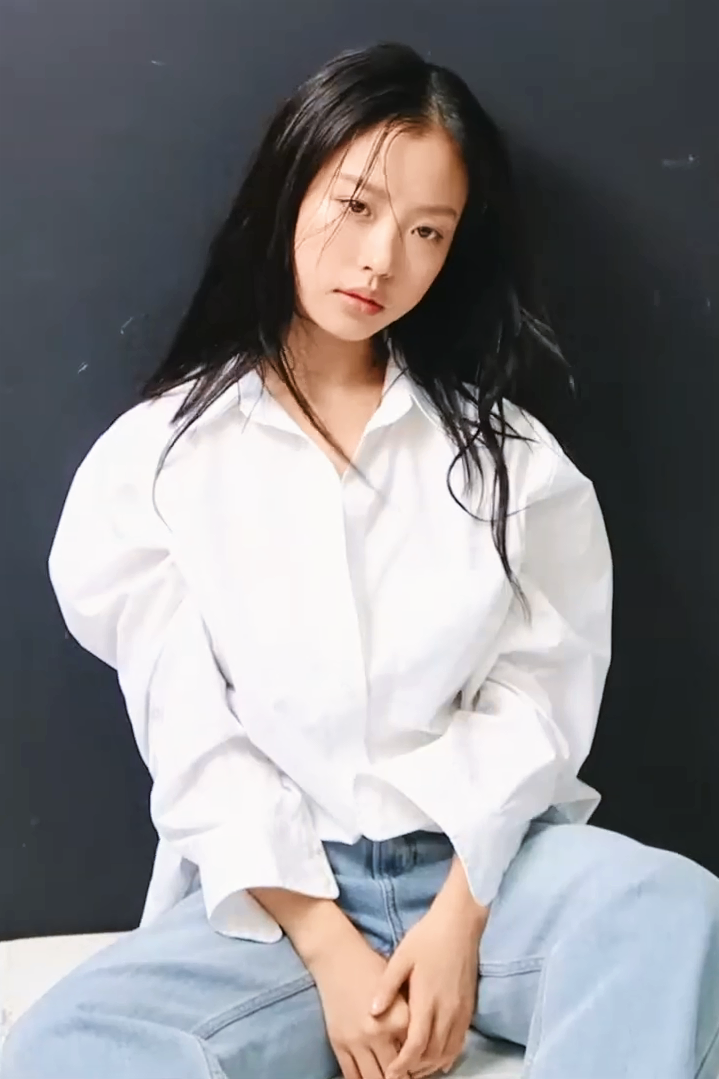 주목받는 #뉴페이스 배우 #고민시 와 함께한 하루.